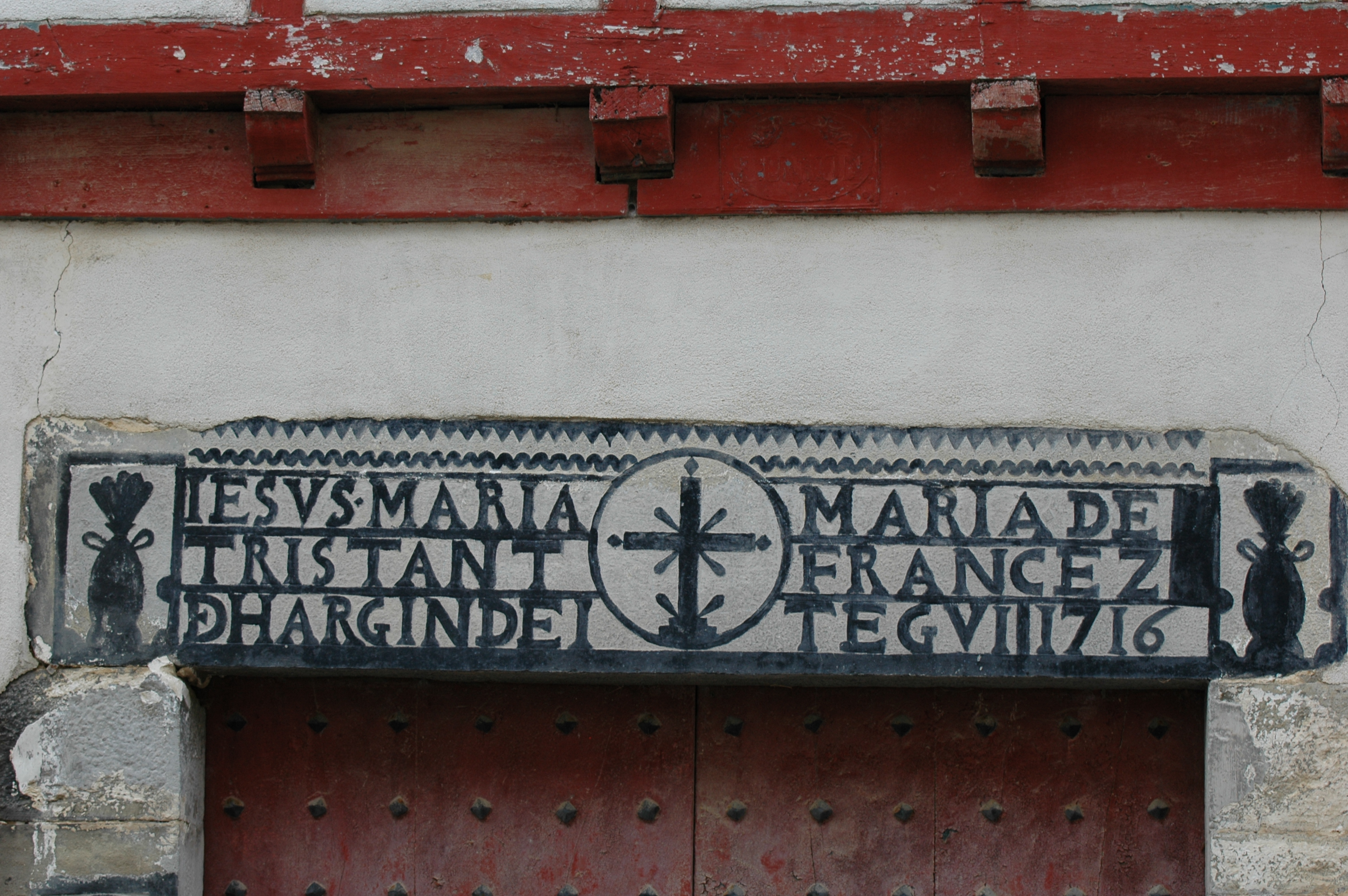 Iholdy, linteau sculpté